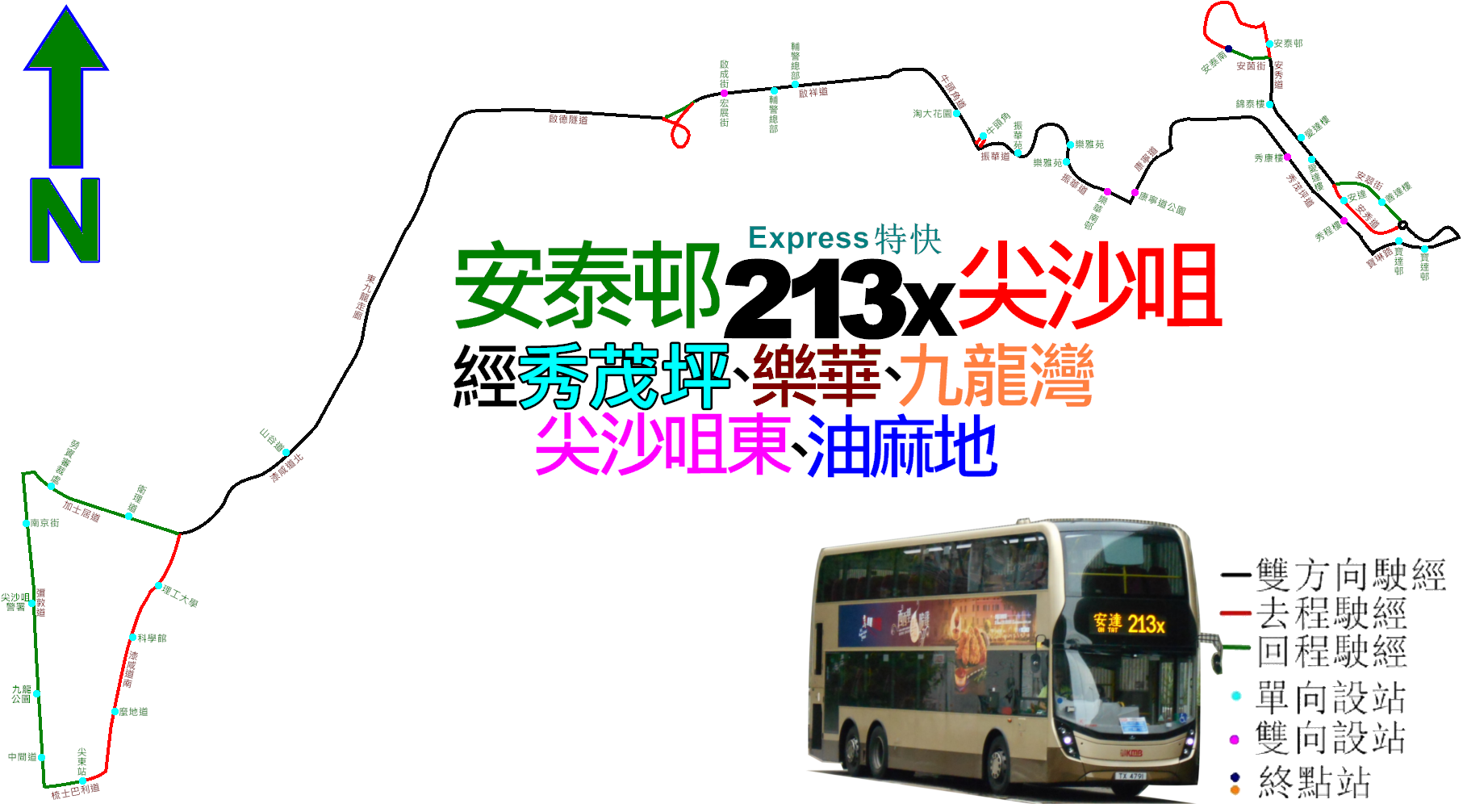 中文（香港）: 九巴213X線的走線圖